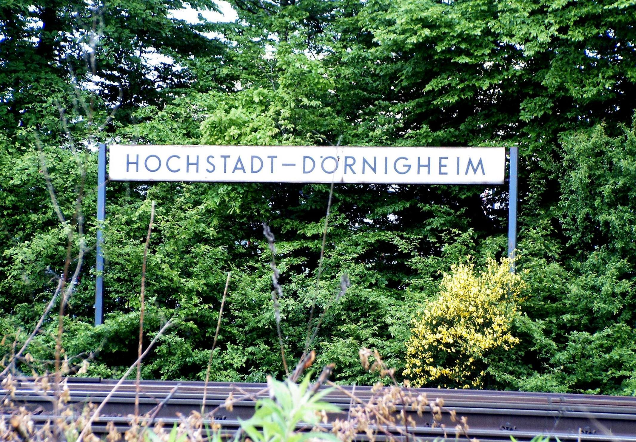 Ehemaliges Bahnhofsschild des heutigen Bahnhofs Maintal Ost.